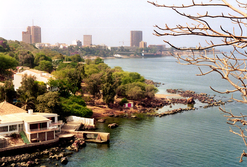 Senegal Baie de Dakar